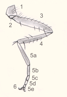 Artejos de la pata de un insecto/Segments of an insect leg